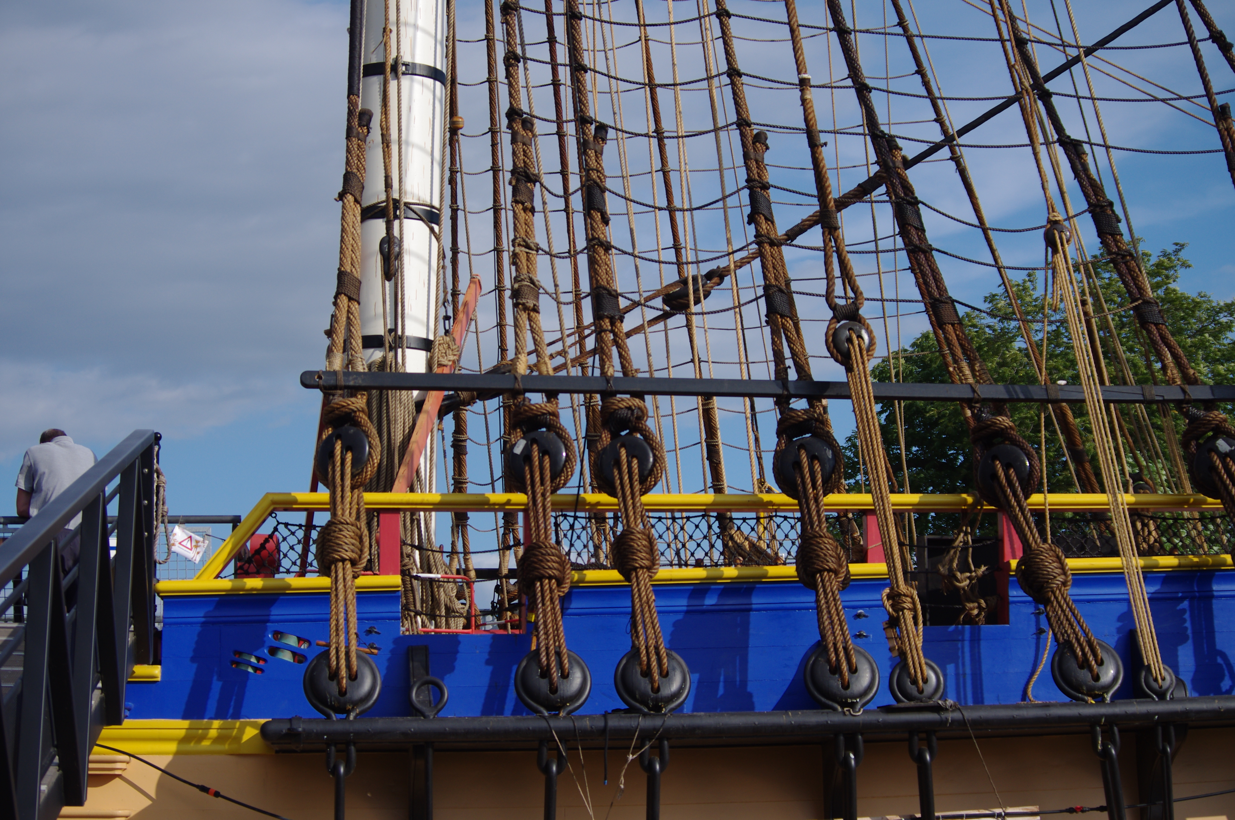 Reconstitution de la Frégate Hermione, au port de Rochefort sur Mer (France). Vue de la dunette où se trouvent le logement des officiers.